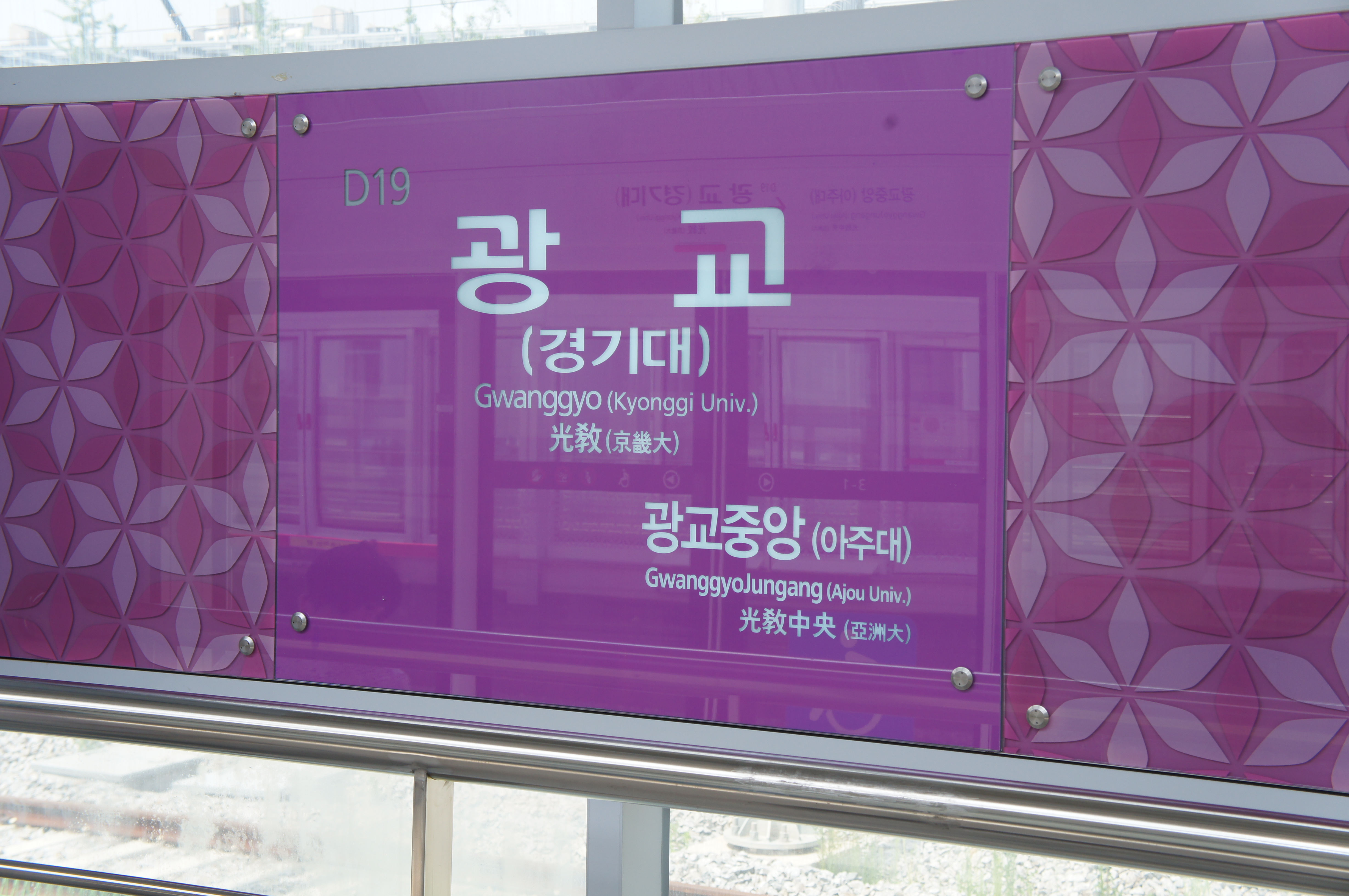 광교역 역명판